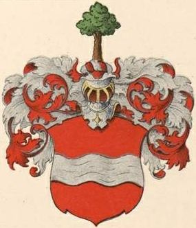 Rönne suguvõsa aadlivapp